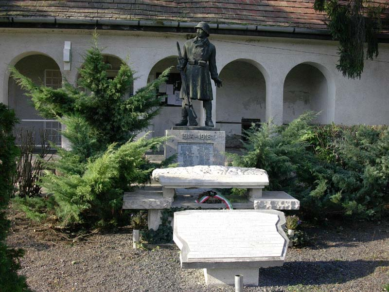 Kajászó - I. világháborús emlék - saját fotó